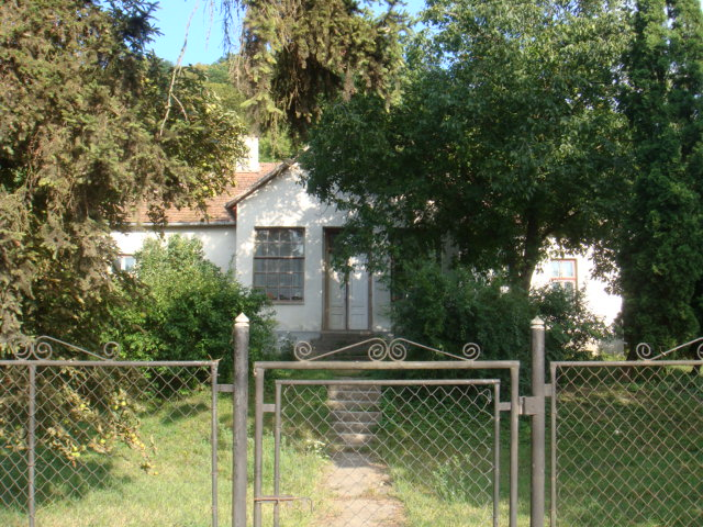 Poza 1